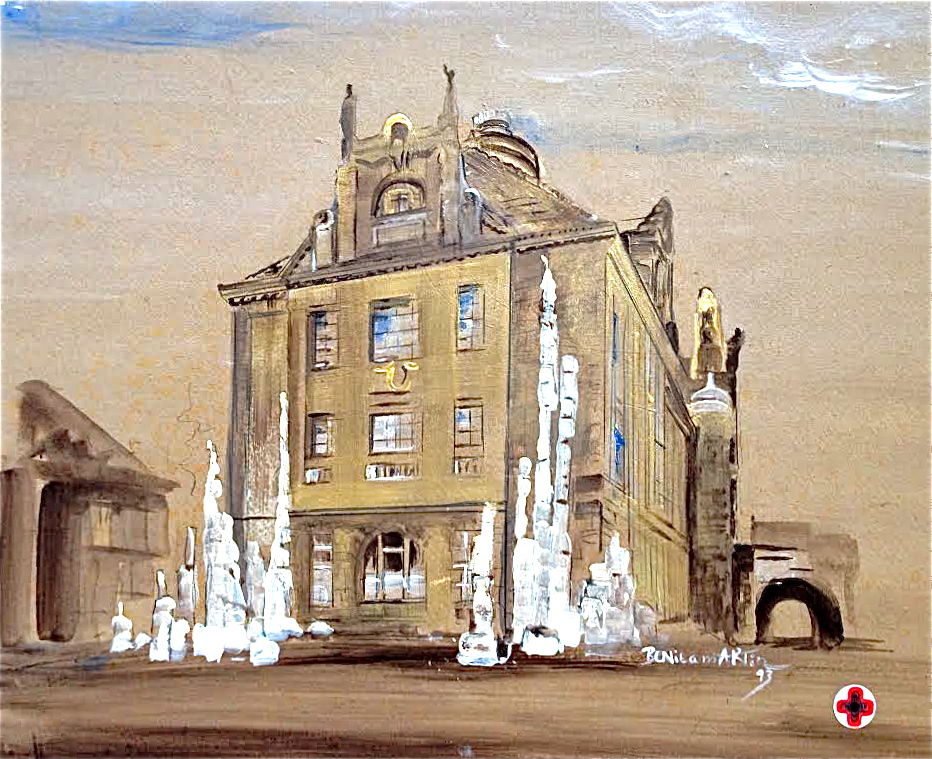 König- Albert- Museum Chemnitz um 1930, Benita Martin, ADA Dimensionsmalerei®